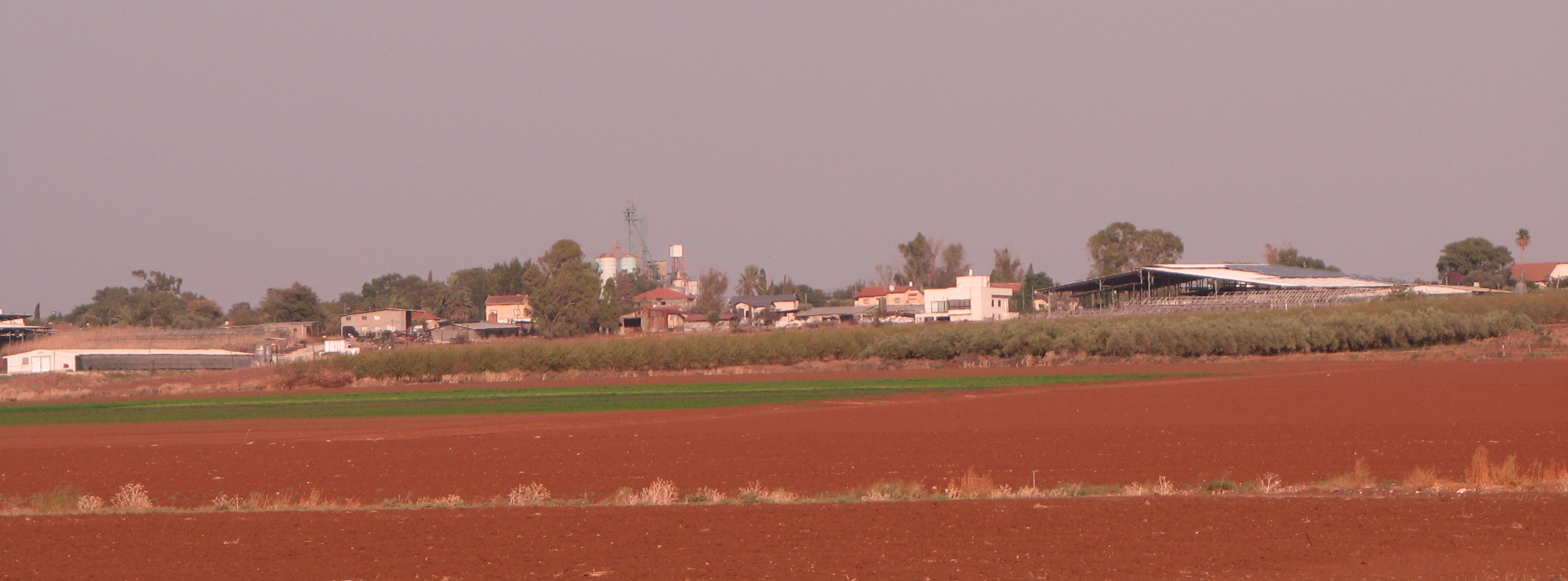 רמת צבי